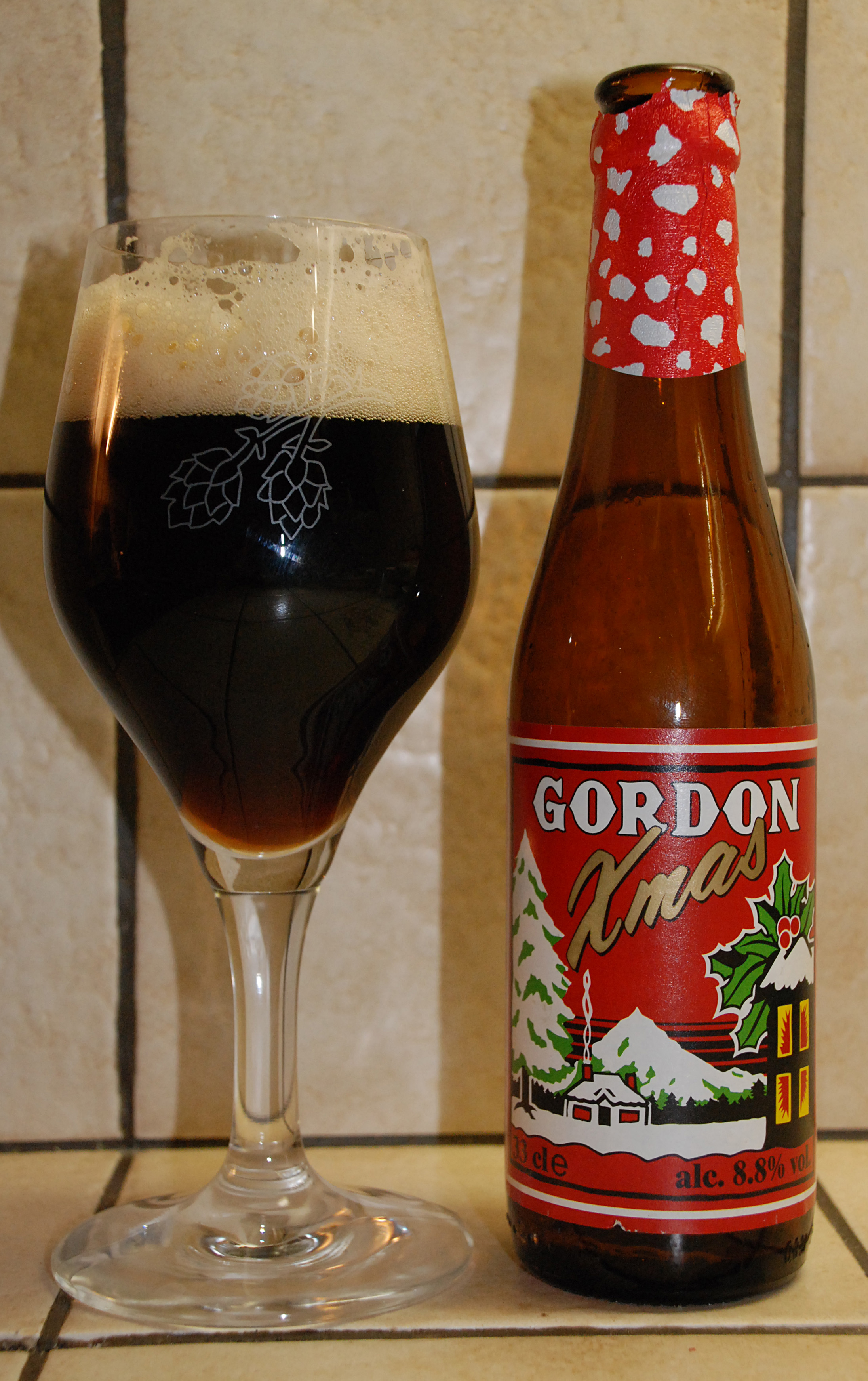 Gordon Xmas